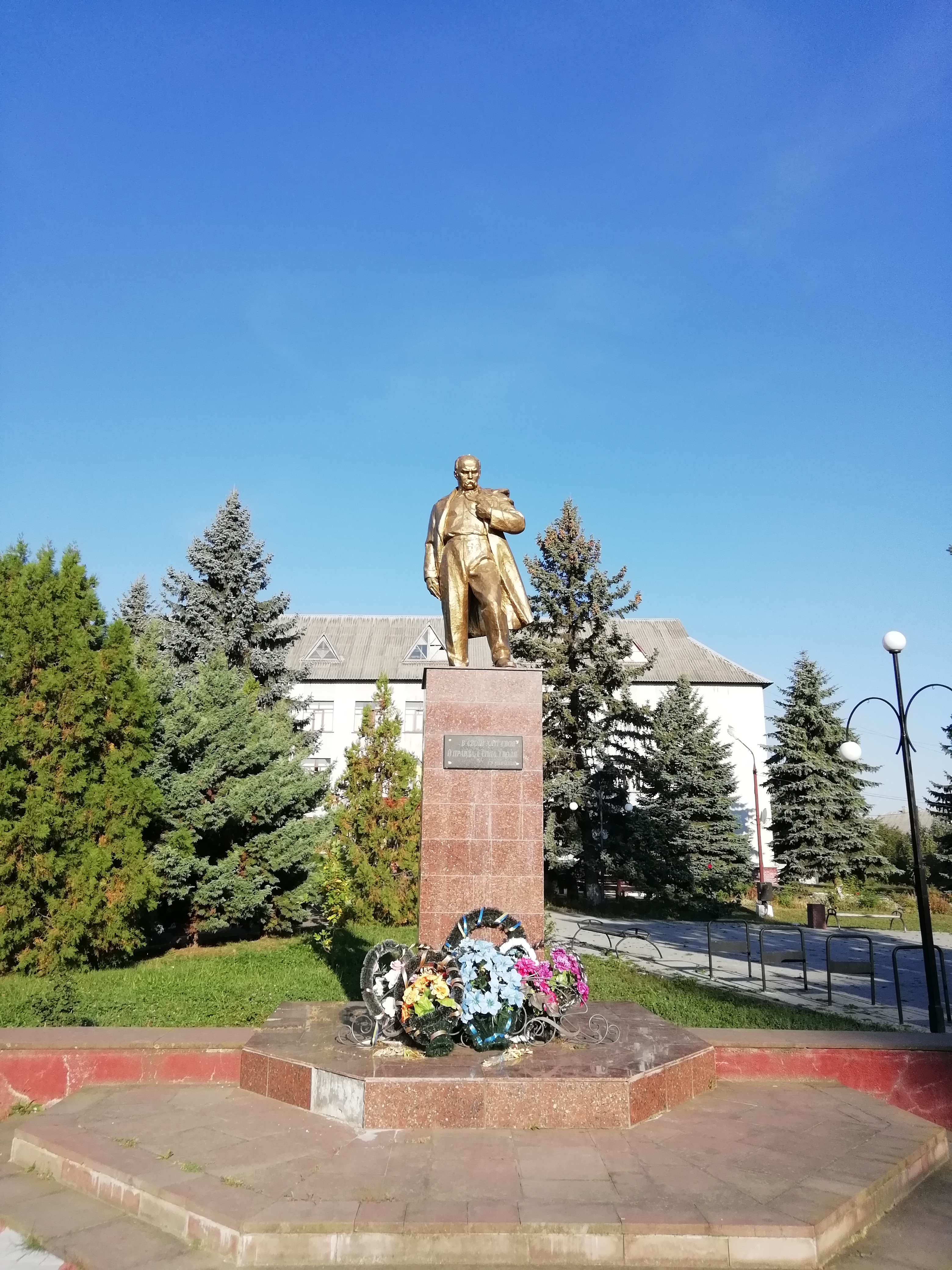 Пам'ятник ШевченкуТ. Г. — українському письменнику, Глибока, пл. Героів Майдану